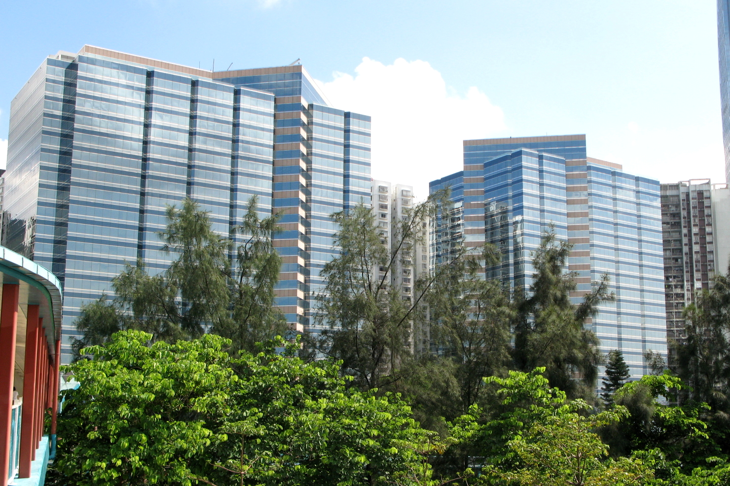 Cityplaza III&IV